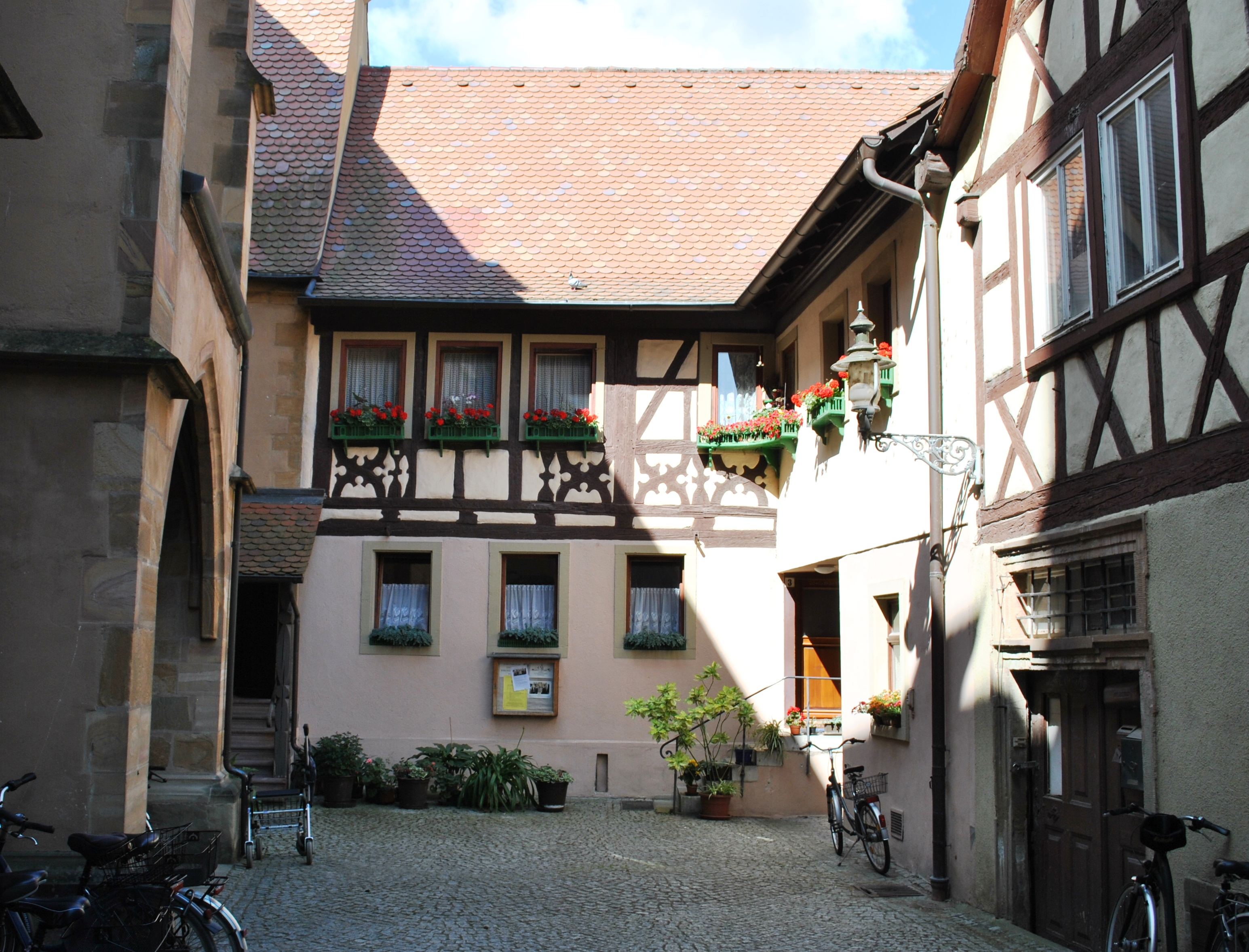 Ehemalige Lateinschule Zweigeschossiger traufständiger Satteldachbau mit Fachwerkobergeschoss, 16./17. Jahrhundert D-6-75-174-75